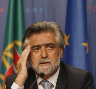 El Ministro de Negocios Extranjeros de Portugal